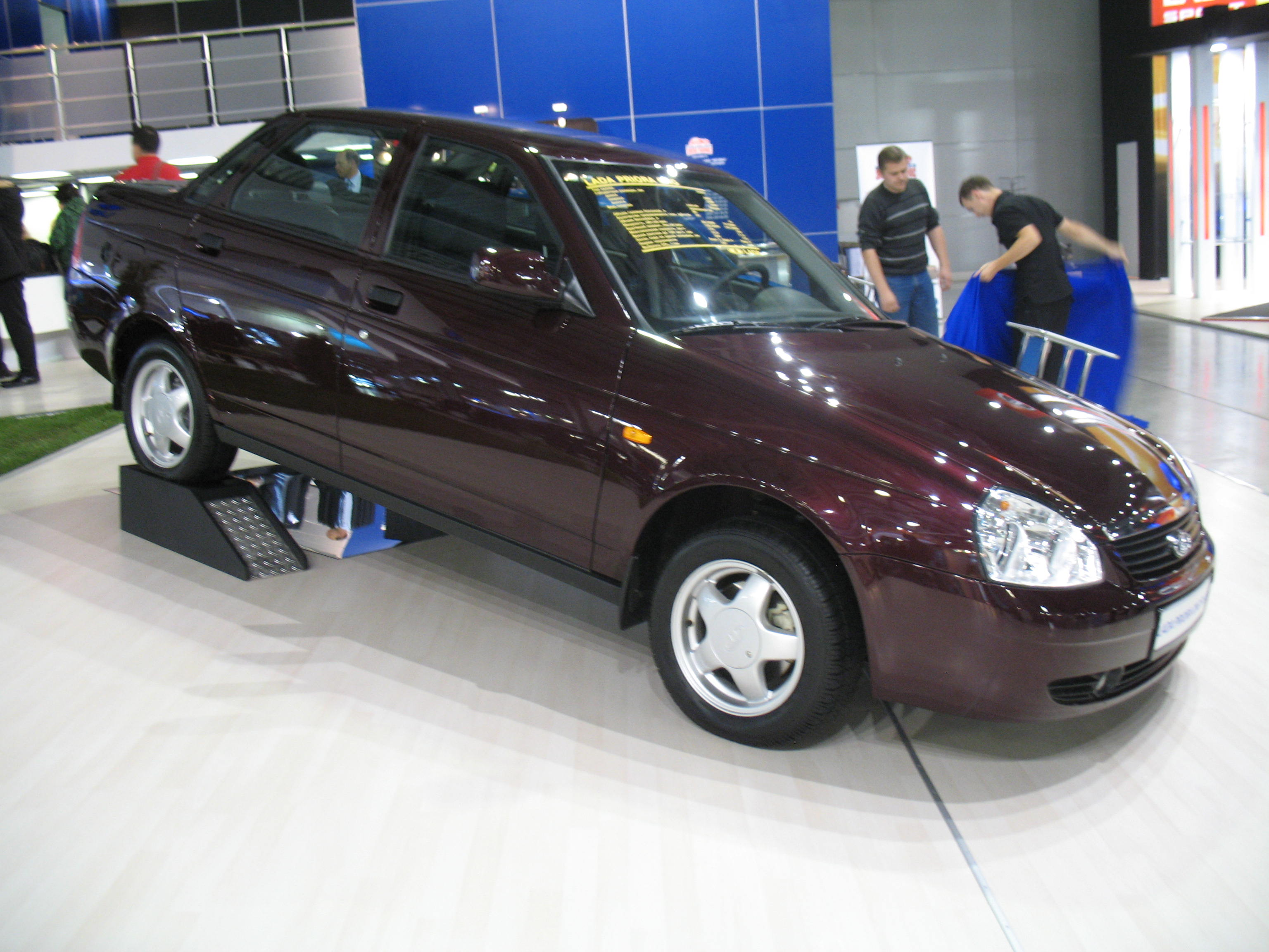 LADA Priora CNG_ВАЗ-2170 СПГ, на ММАС-2008